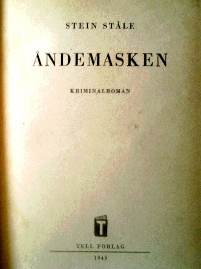 Åndemasken, tittelblad, 1943